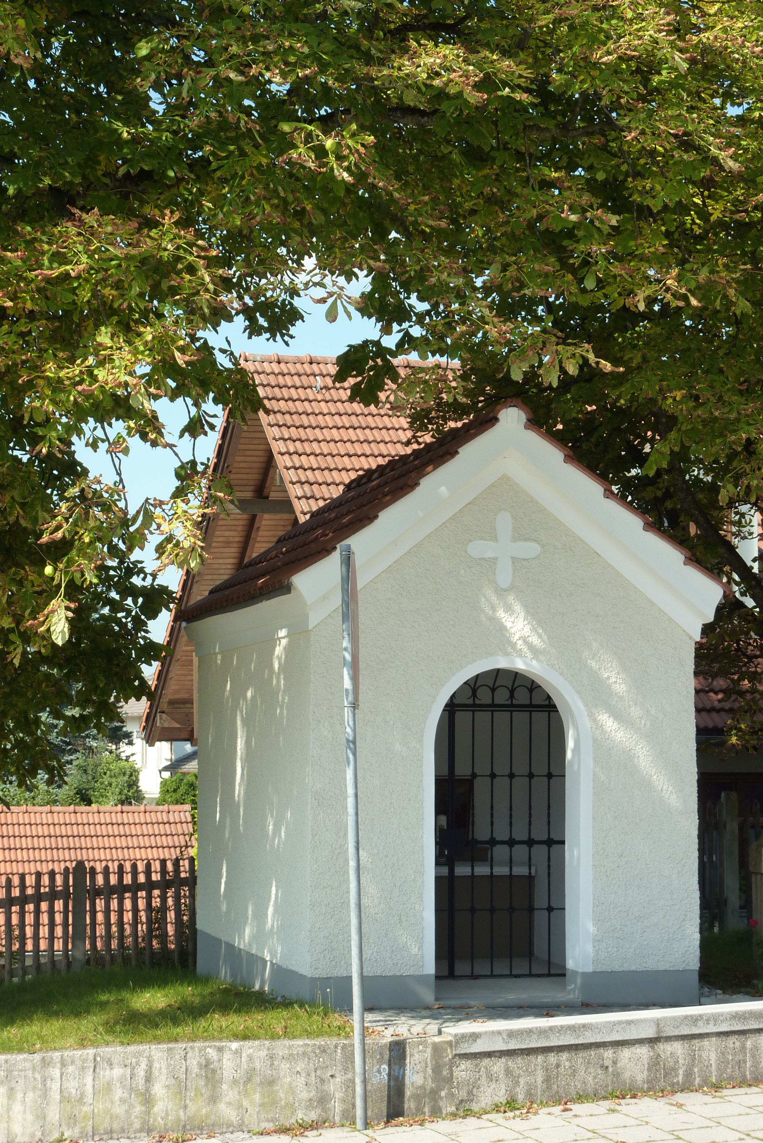 82024 Taufkirchen, Hohenbrunner Weg/Ecke Dorfstraße Wegkapelle, Innen halbrund geschlossener Rechteckbau mit breitem Traufgesims, bez. 1923 Denkmal-Nummer: D-1-84-145-2 Standort: 48.042082 11.621915)